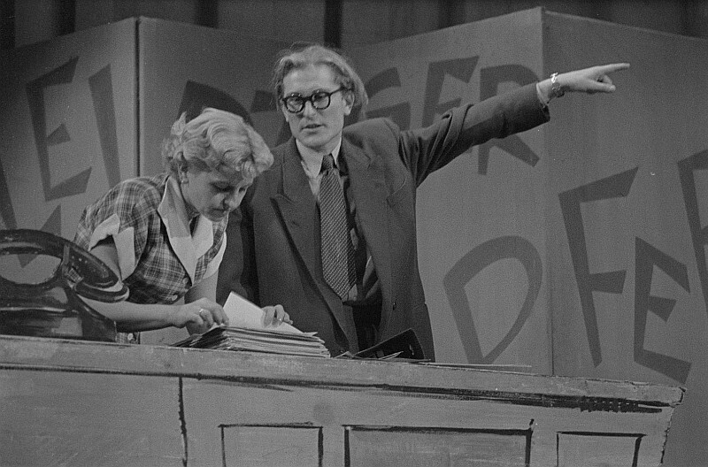 Original image description from the Deutsche Fotothek Kabarettisten der Leipziger Pfeffermühle bei ihrer II. Folge im Weißen Saal